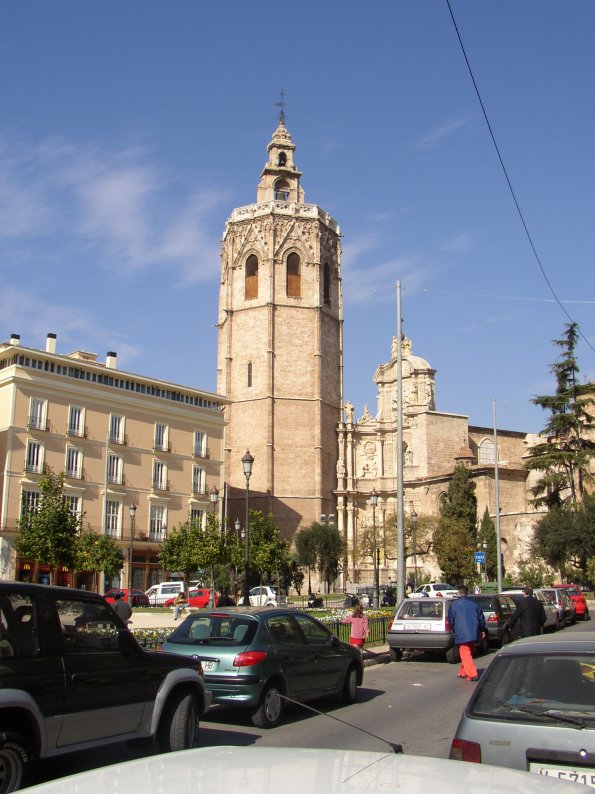 Valencia (Comunidad Valenciana), España. Valencia. Catedral y torre del Miguelete. Fotografía realizada el 11 febrero de 2003 por el autor Usuario. Pelayo2.